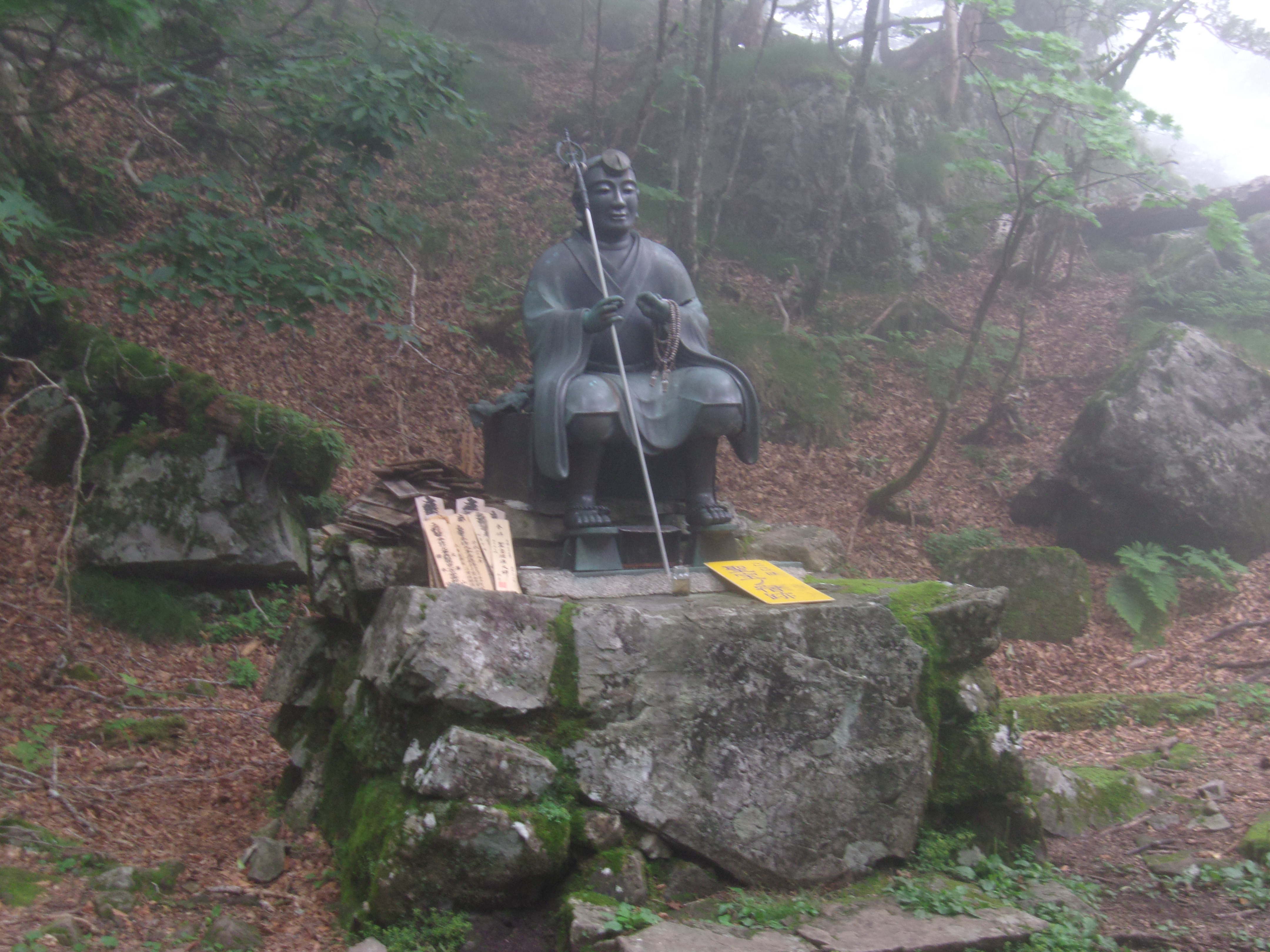 大峯奥駈道第55靡「講婆世宿（聖宝宿）」の理源大師像